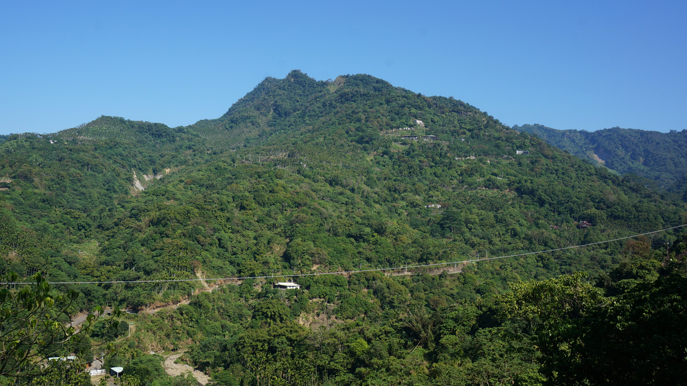 中文（台灣）: 太平暗影山